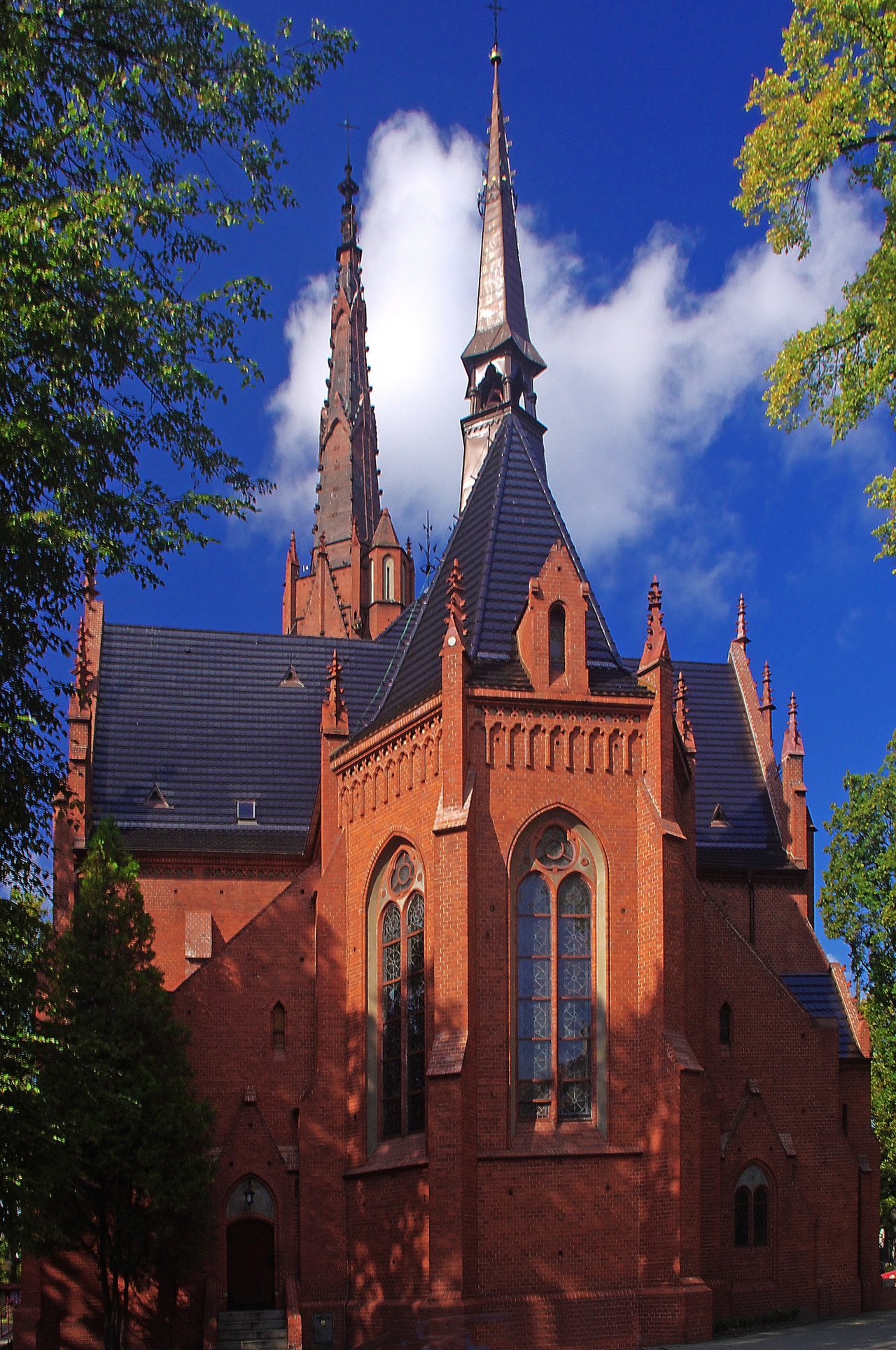 kościół parafialny pw. Chrystusa Króla z 1902 r., cmentarz kościelny Rawicz, ul. kardynała Wyszyńskiego, Rawicz